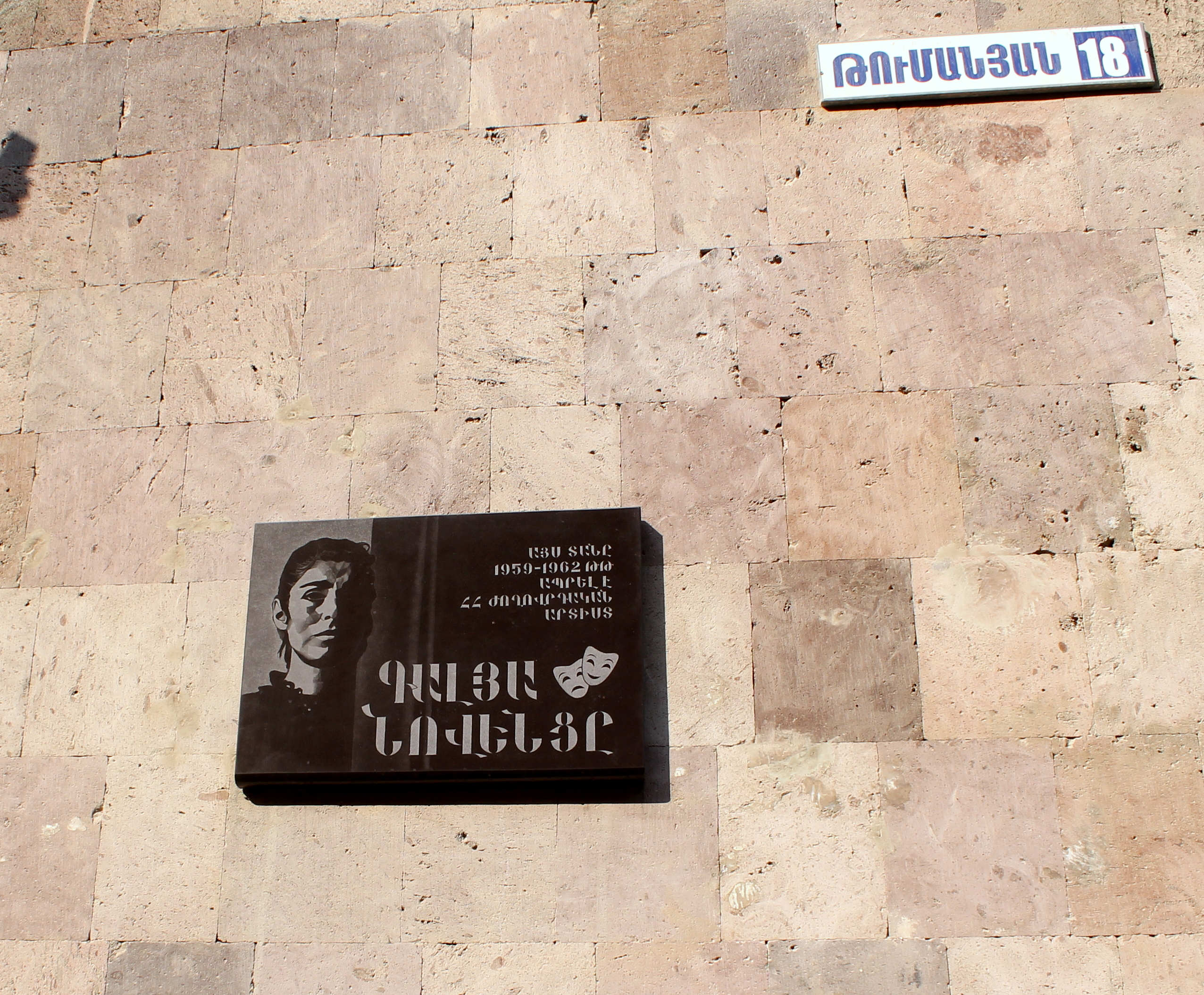 Գալյա Նովենցի հուշաքարը Կապանում